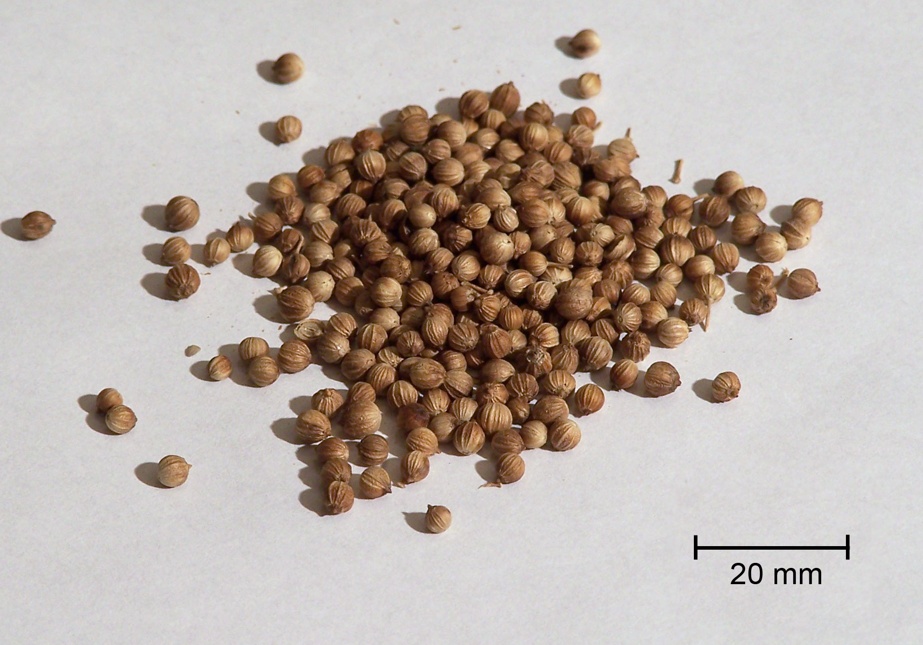 dried coriander seeds